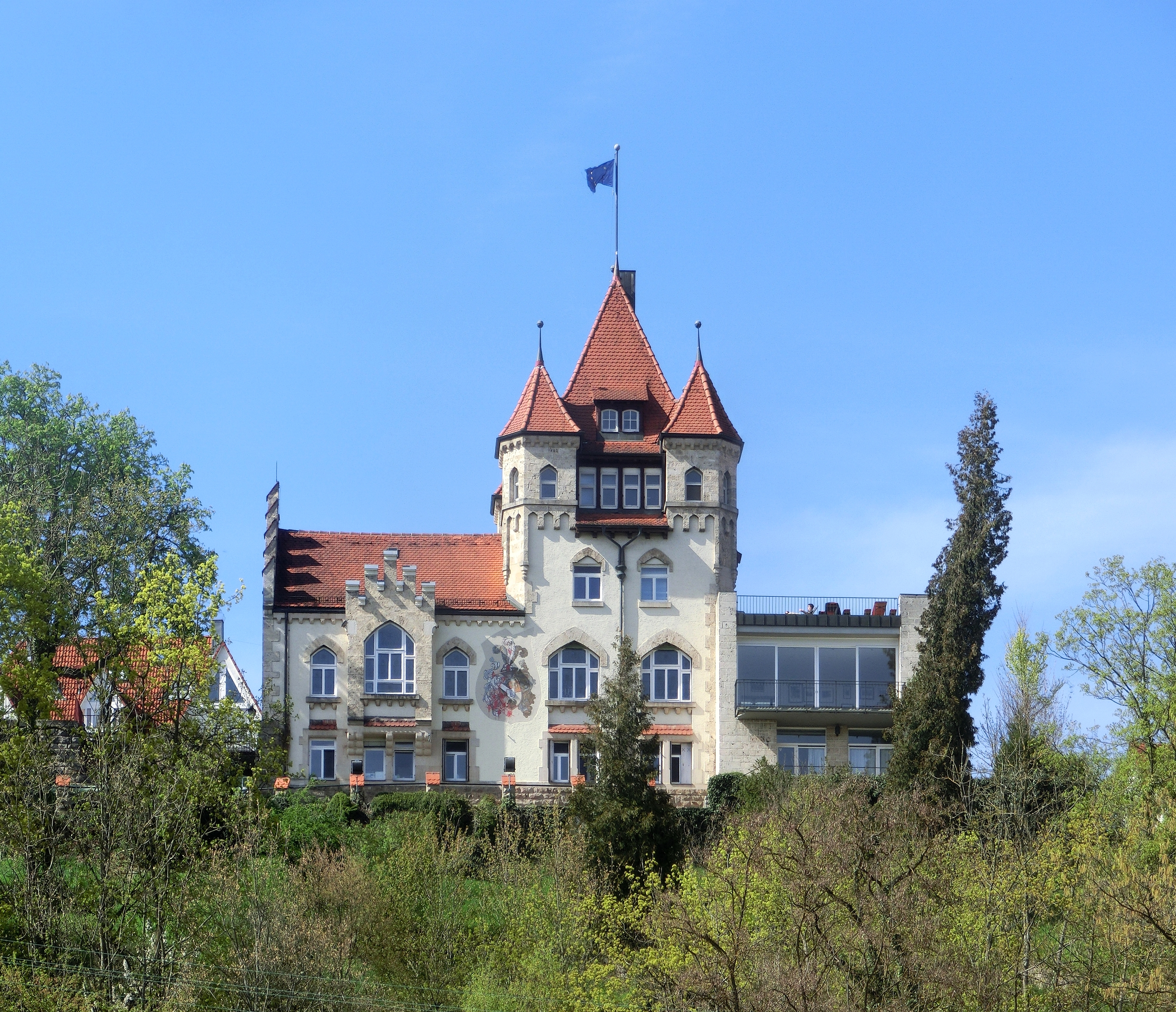 Tübingen. Das Igelhaus (Verbindungshaus der Akademischen Verbindung Igel Tübingen) in der Schlossbergstraße.